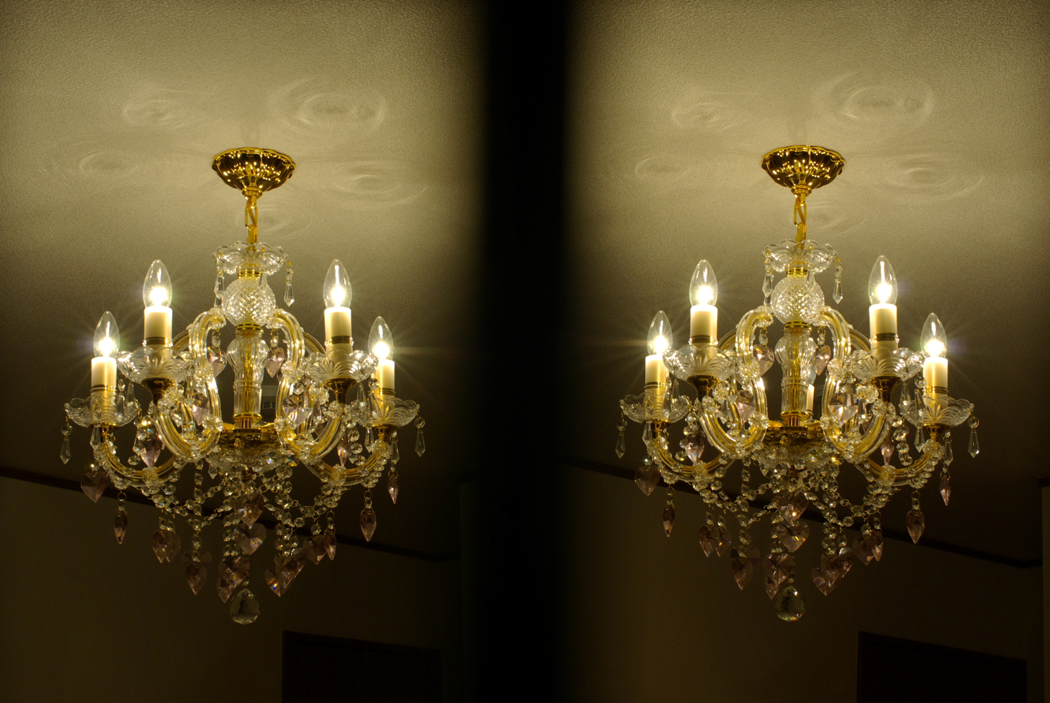 PENTAX STEREO ADAPTERによるステレオ画像の例。 PENTAX K10D + smc PENTAX-DA 1:2.8 35mm Macro Limited